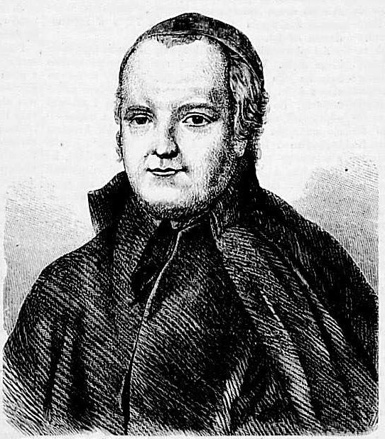 Stanisław Konarski 1700-1773